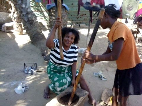 Tous les matins, est acheté le café vert, il est grillé à la poèle et moulu à la main. (mandisa café)